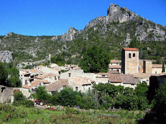 Photo du village de Saint-Guilhem-le-Désert (Hérault, France) 2004. Cevenol2